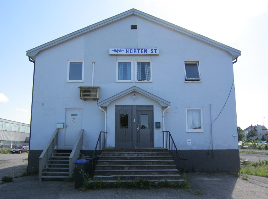 Horten stasjon